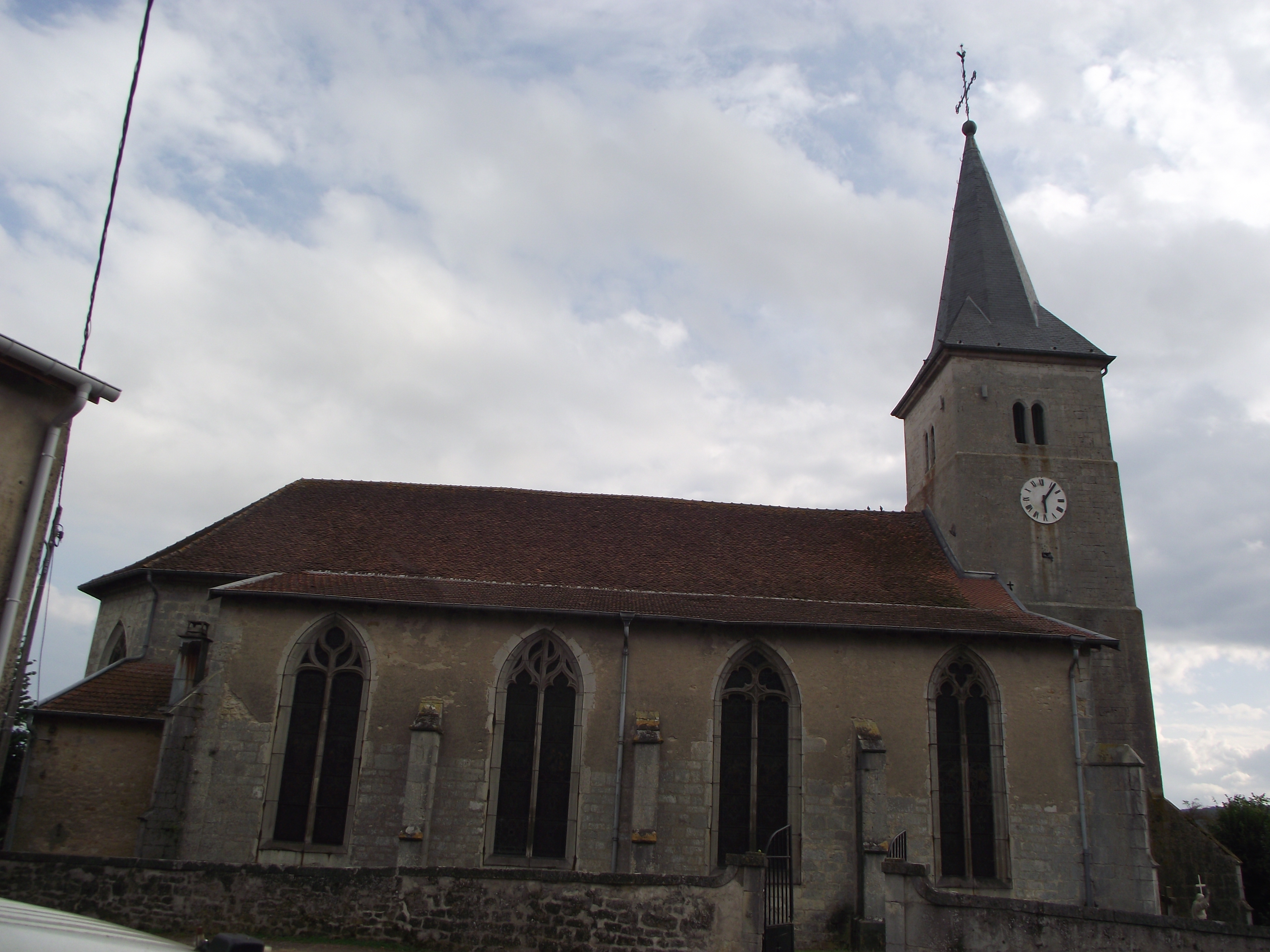 église Goviller vue de coté